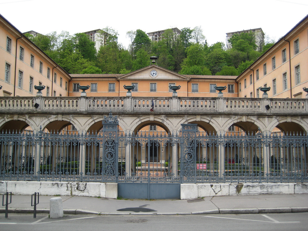 Conservatoire national supérieur musique et danse de Lyon dans l'ancien couvent des Dames de Sainte-Élisabeth, construit à la fin du XVIIe siècle et en grande partie reconstruit au XIXe siècle pour abriter l'école nationale vétérinaire de Lyon.